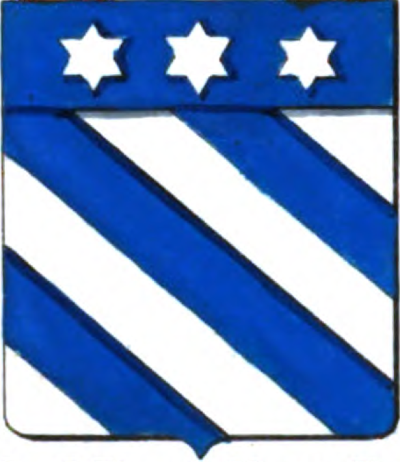 D'argent, à trois bandes d'azur, au chef de même, chargé de trois étoiles à six rais d'argent.